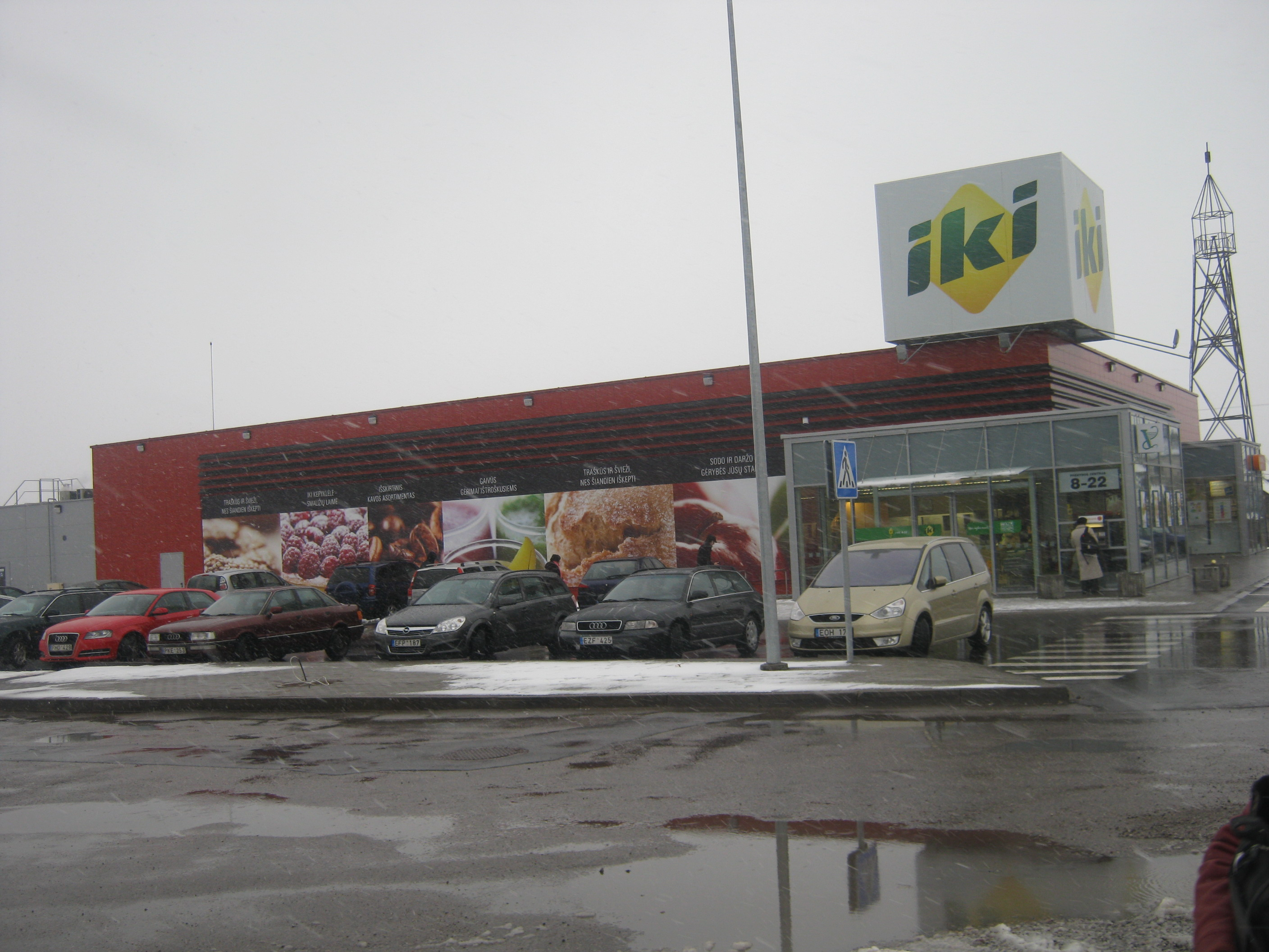 Ramučiai